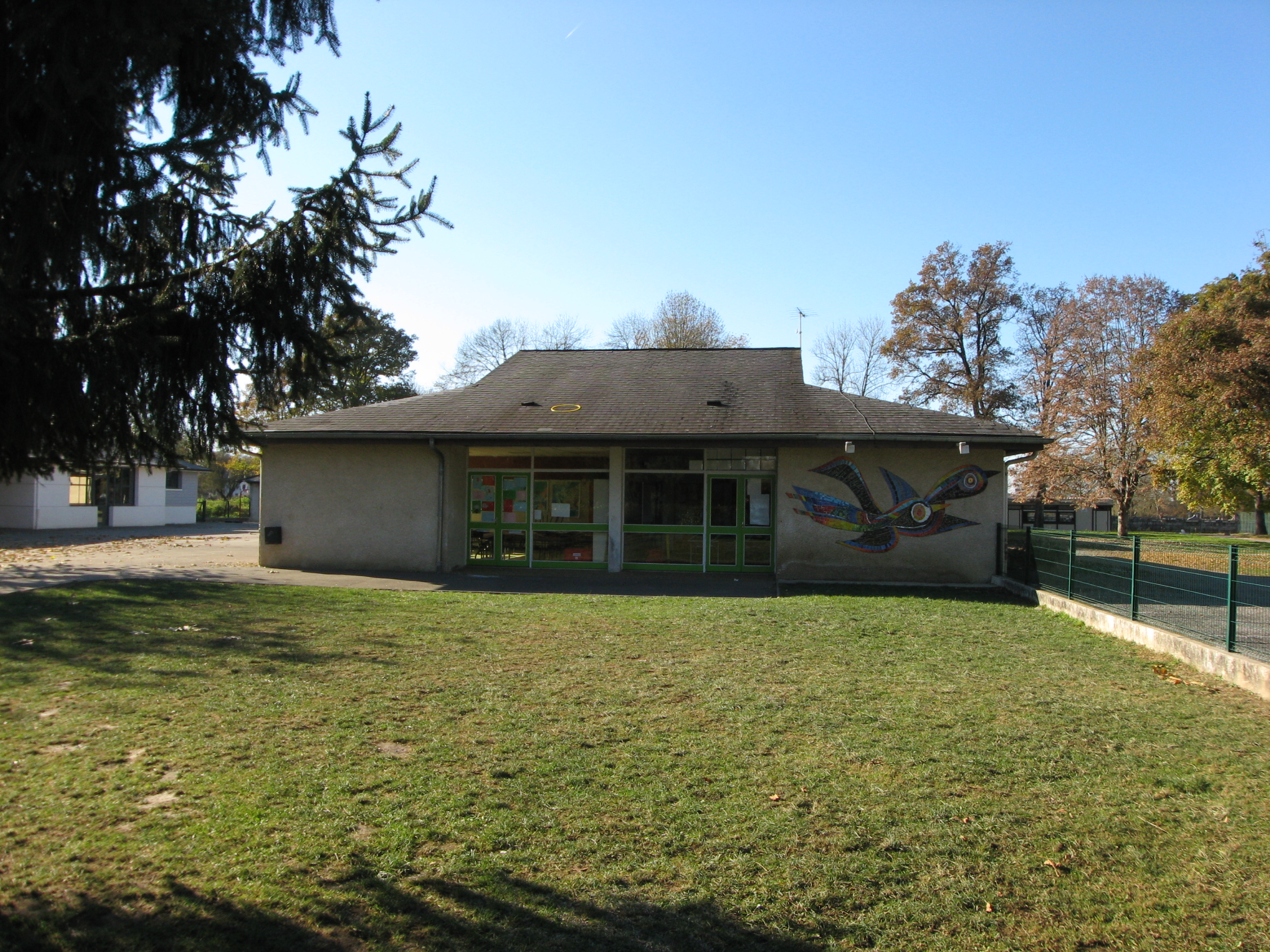 Ecole primaire d'Ogeu-les-Bains (Pyrénées-Atlantiques) (Pyrénées).